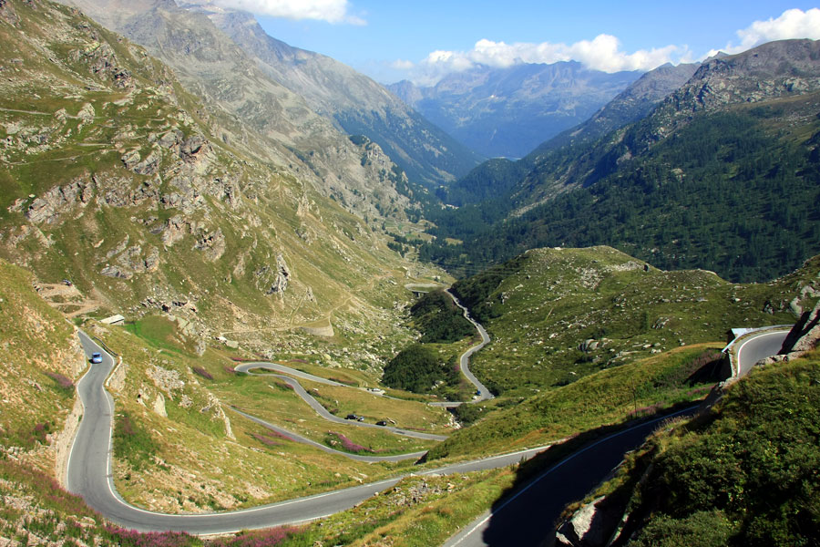 Alta Valle dell'Orco nei pressi del lago Serrù